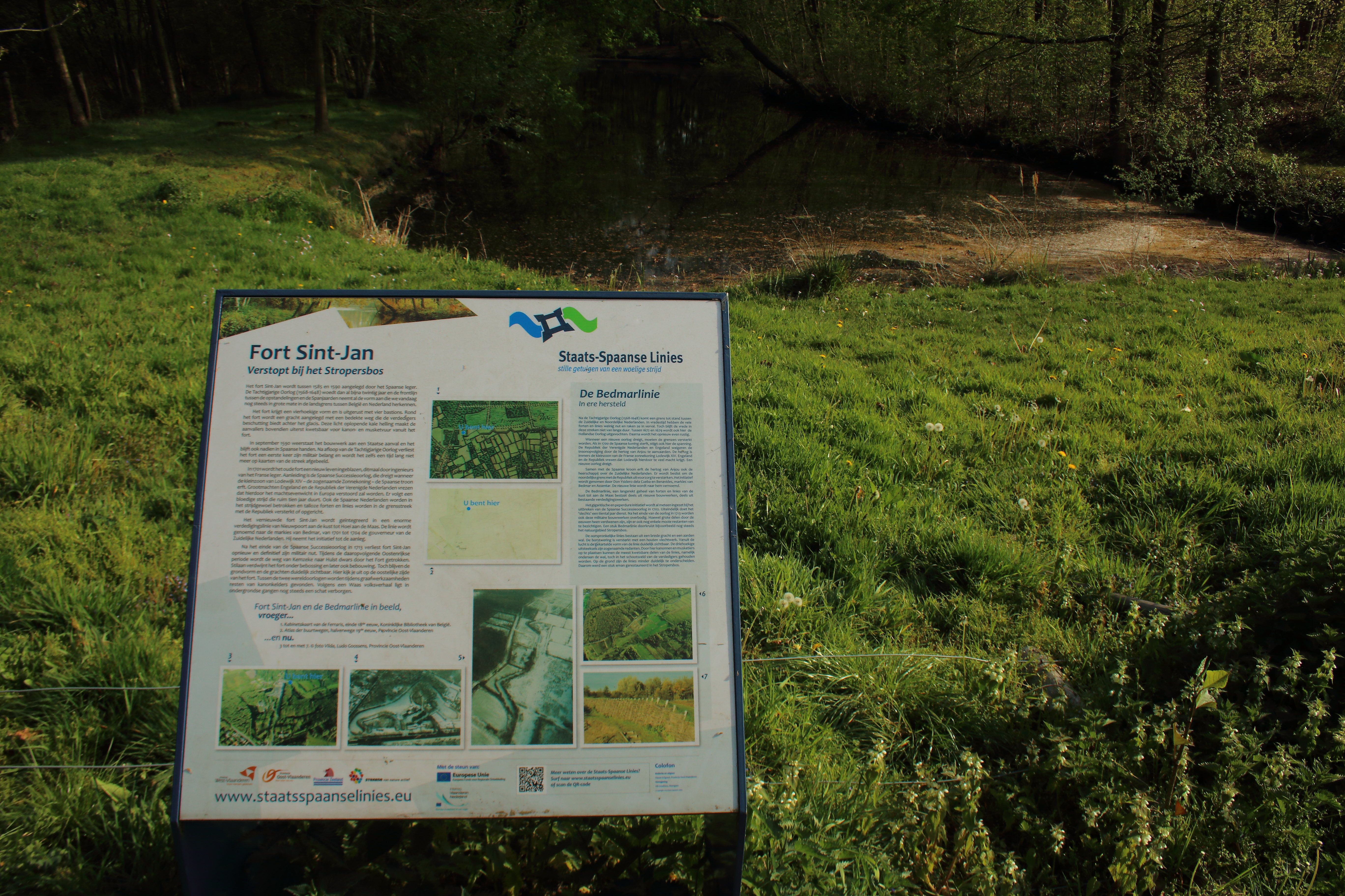 Fort Sint-Jan, Staats-Spaanse linies, Stekene, Vlaanderen, België